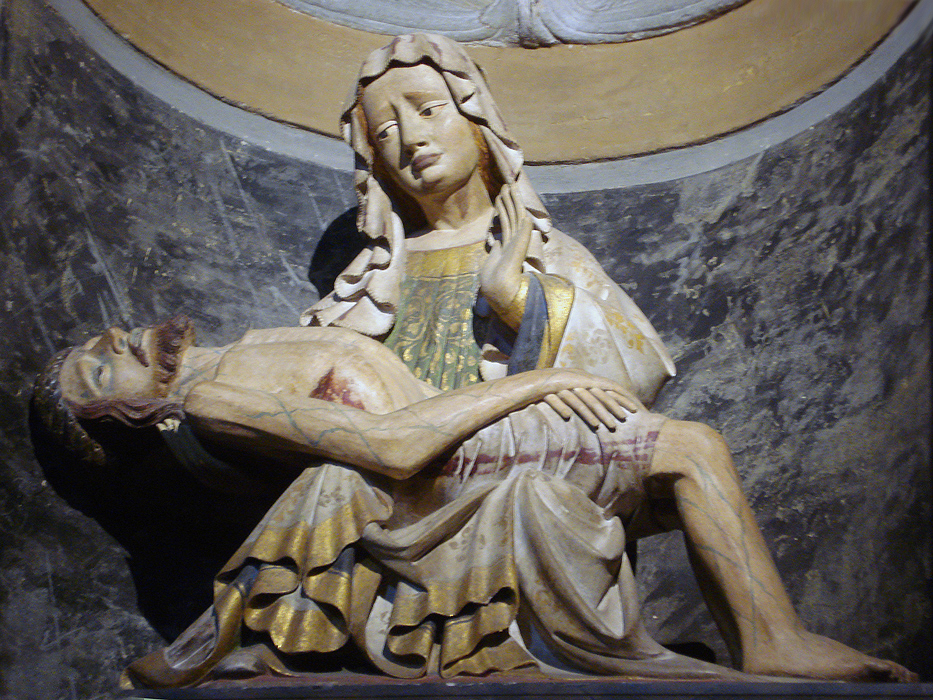 Madonna del pianto, catedral de Cortona